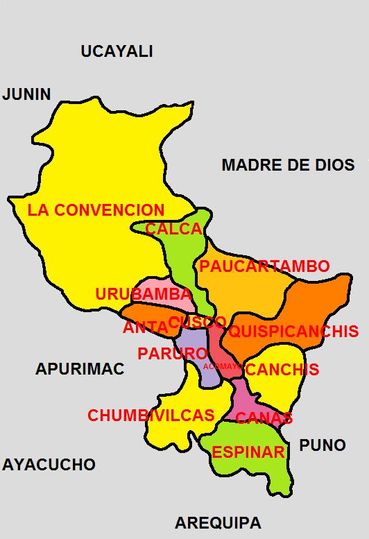 Division Politica del Departamento del Cusco, una de las 25 circunscripciones en que se divide el Perú